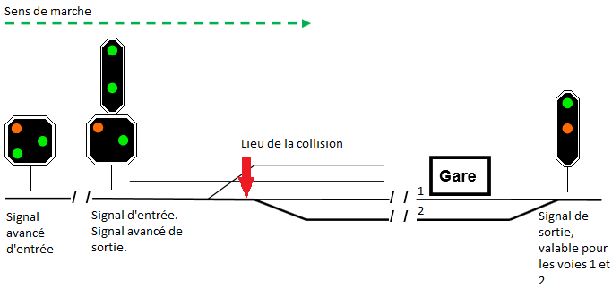 Accident de Granges-Marnand, Suisse, 2013 Arrivée du train RE 4049.